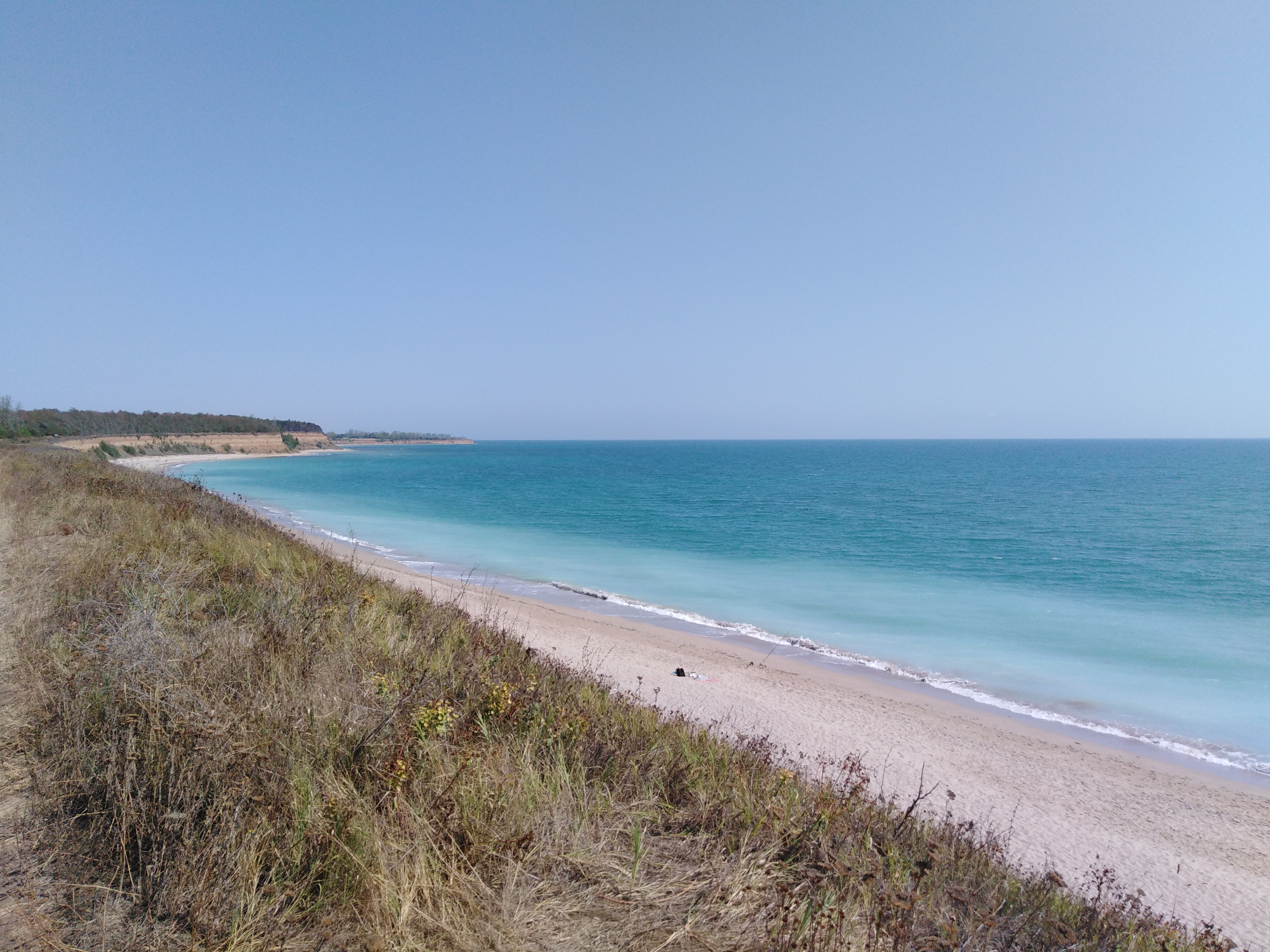 Παραλία στο Έζερετς, Βουλγαρία, Μαύρη θάλασσα